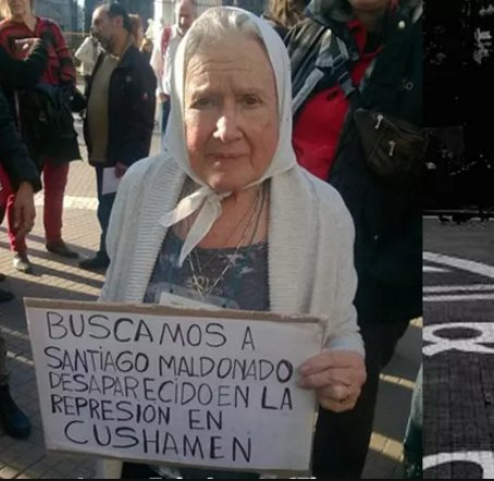 Nora Cortiñas, miembra fundadora de las Madres de Plaza de Mayo, apoyando la aparición con vida de Santiago Maldonado. 11 de agosto de 2017